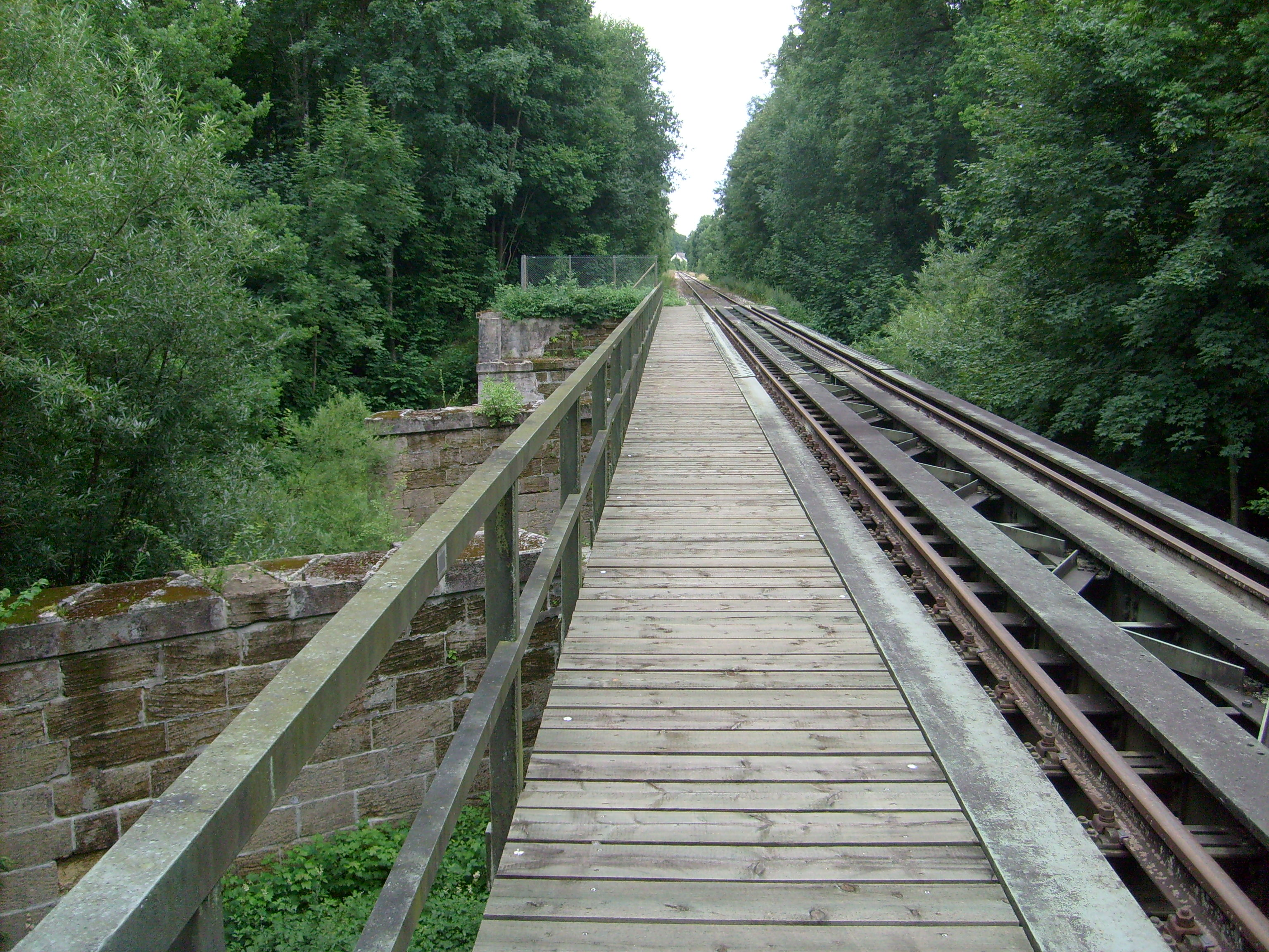 Brücke der Hegau-Ablachtal-Bahn über die Ablach im Fürstlichen Park von Krauchenwies